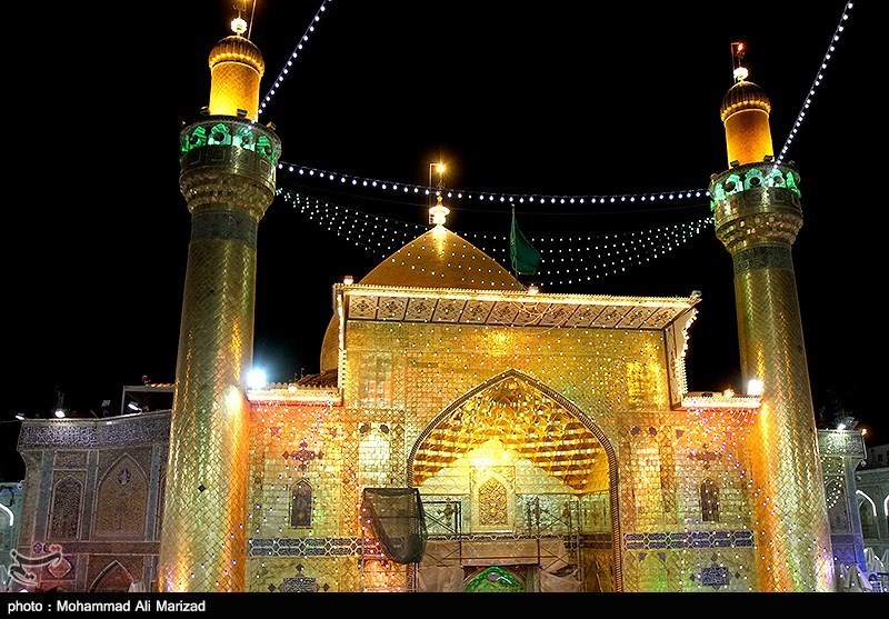 Imam Ali Mosque in Iraq al-Najaf